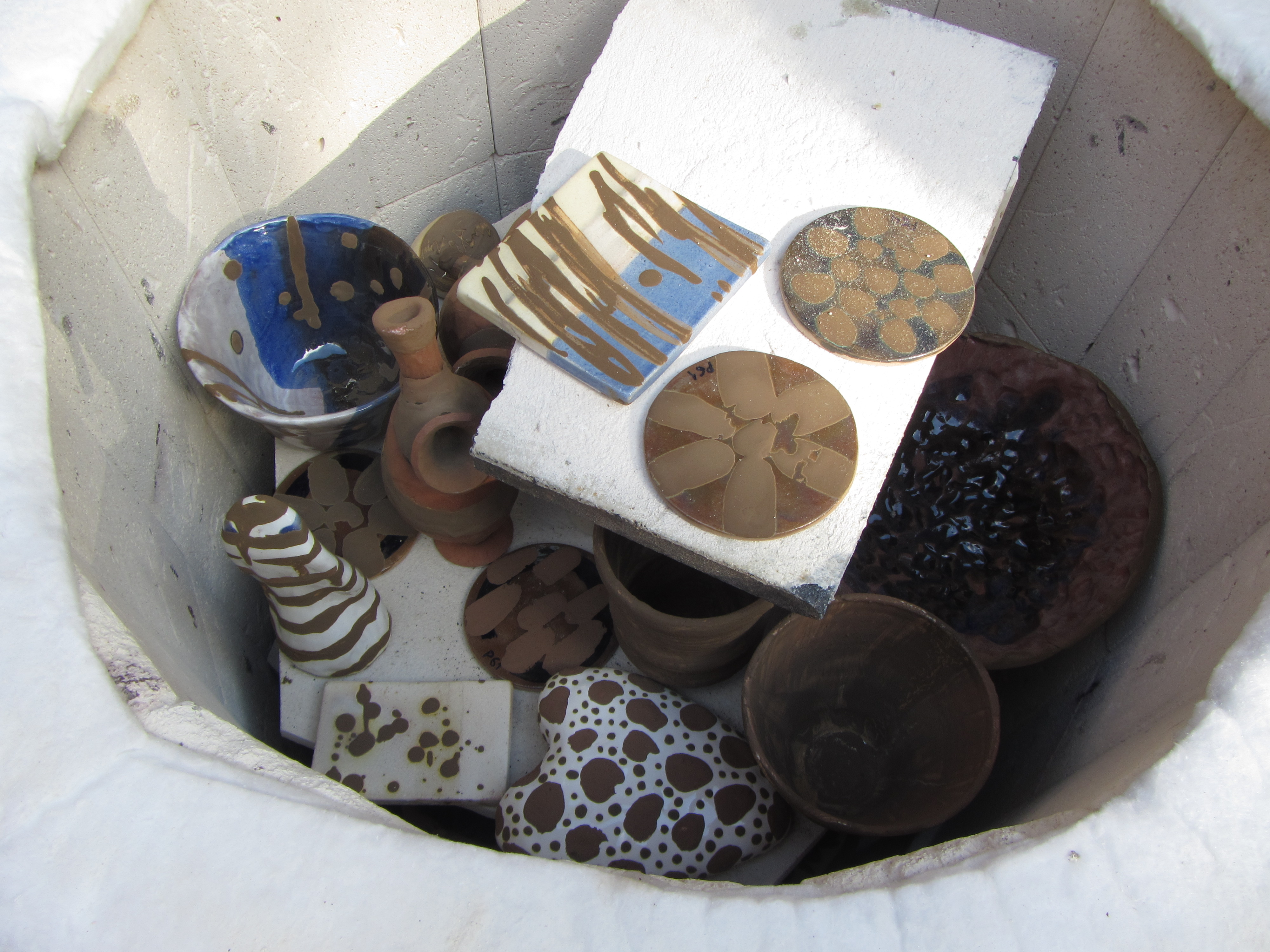 Savipastaga maalitud esemed ahjus. Läti Kunstiakadeemias.